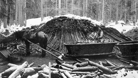 Kolryss